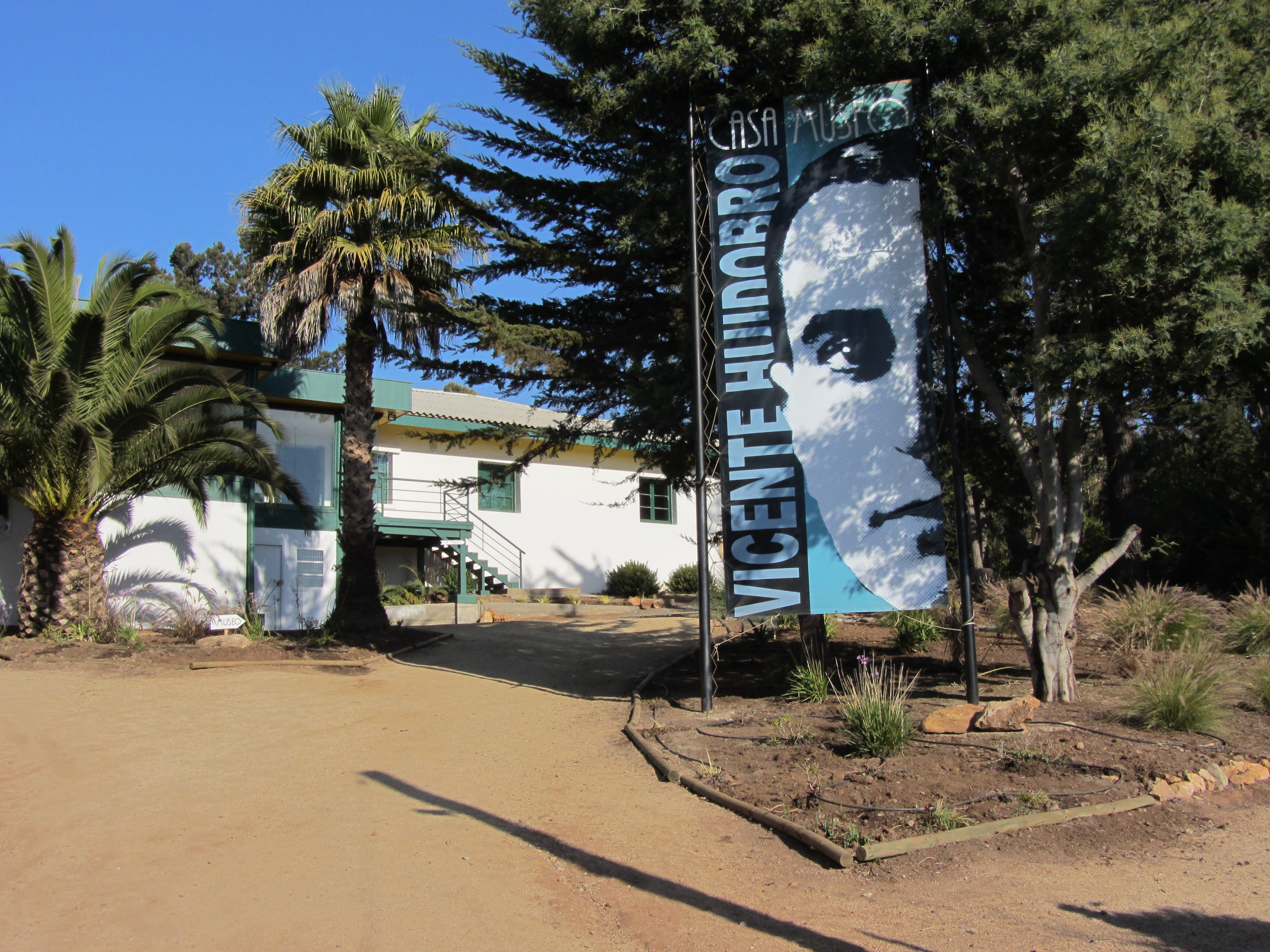 La Casa Museo del poeta chileno :Vicente Huidobro, en Cartagena